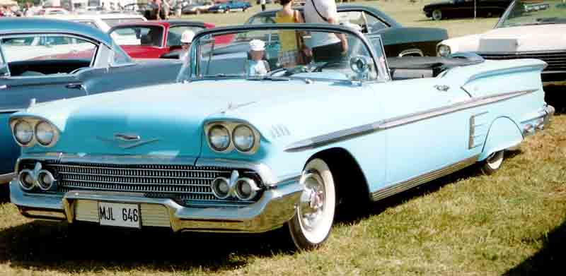 1958 Chevrolet Bel Air Impala, Model 1767 2-door Convertible Coupe